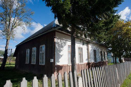 Музей